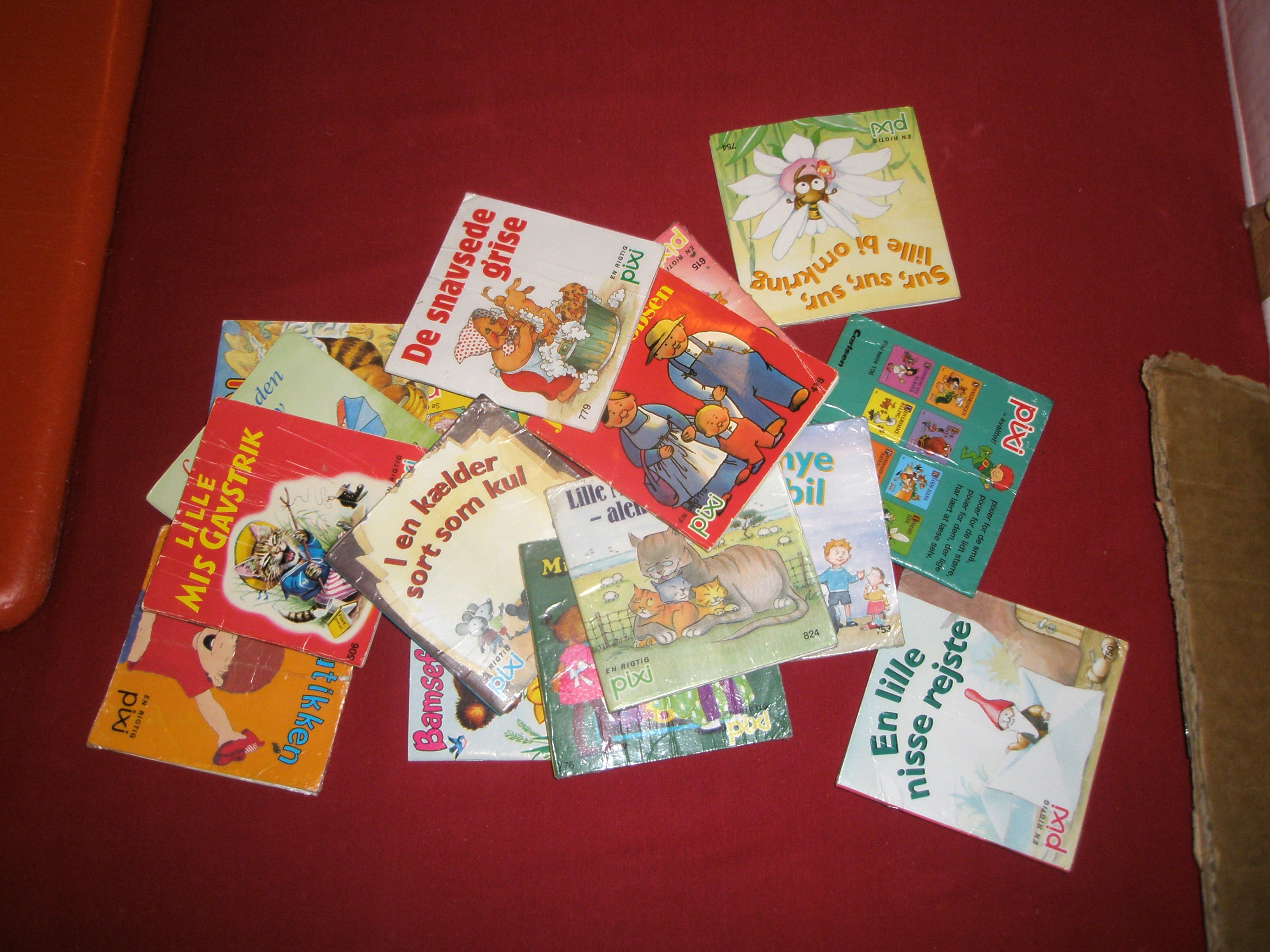 Børnebøger, såkaldte pixibøger